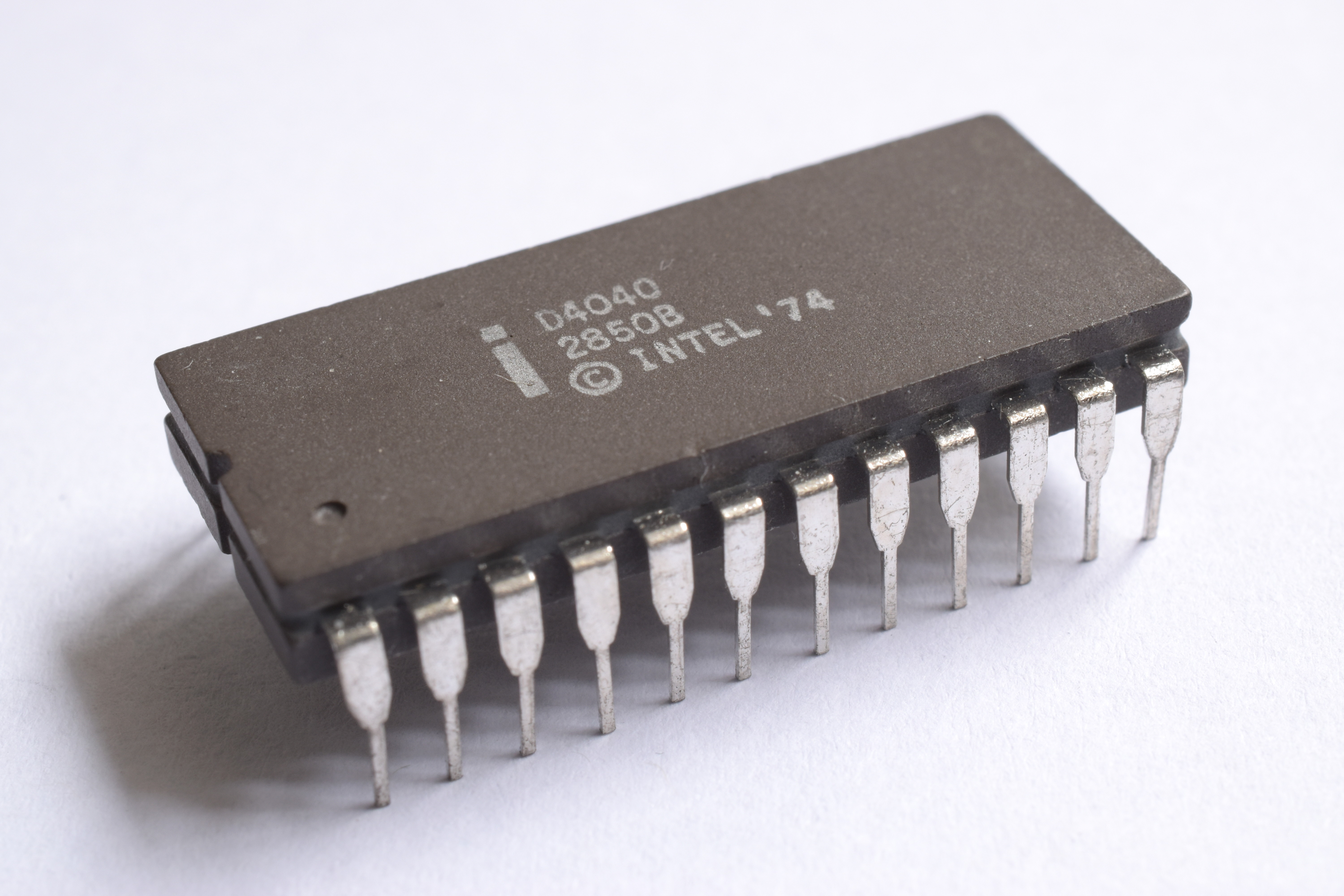 Procesoro Intel D4040.